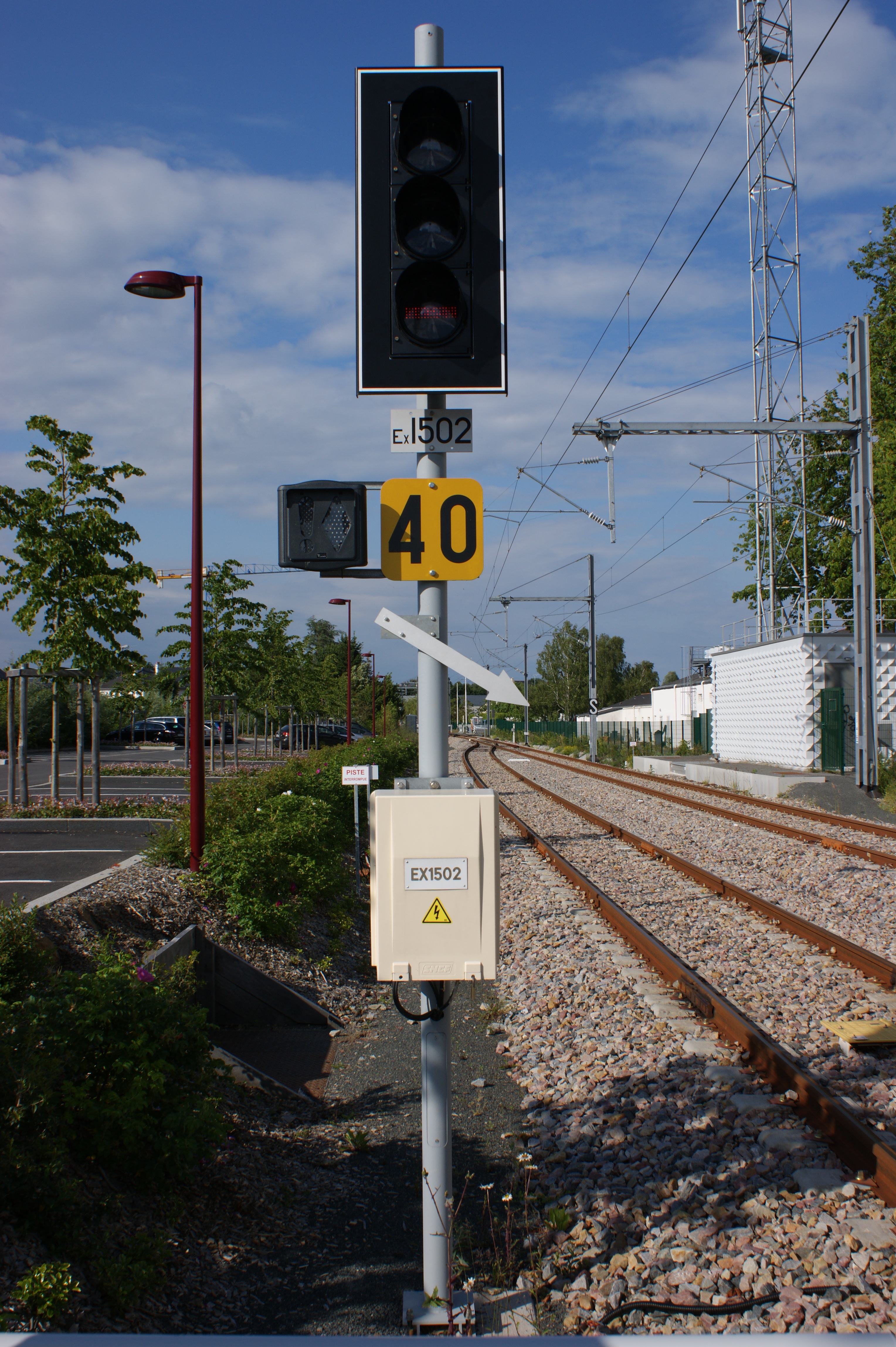 Gare de Sucé-sur-Erdre, signal de sortie.